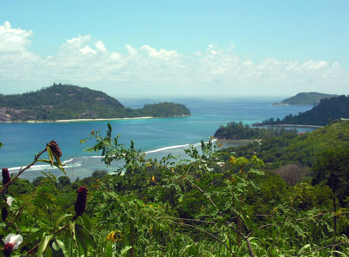 Seychelles, Mahé Island